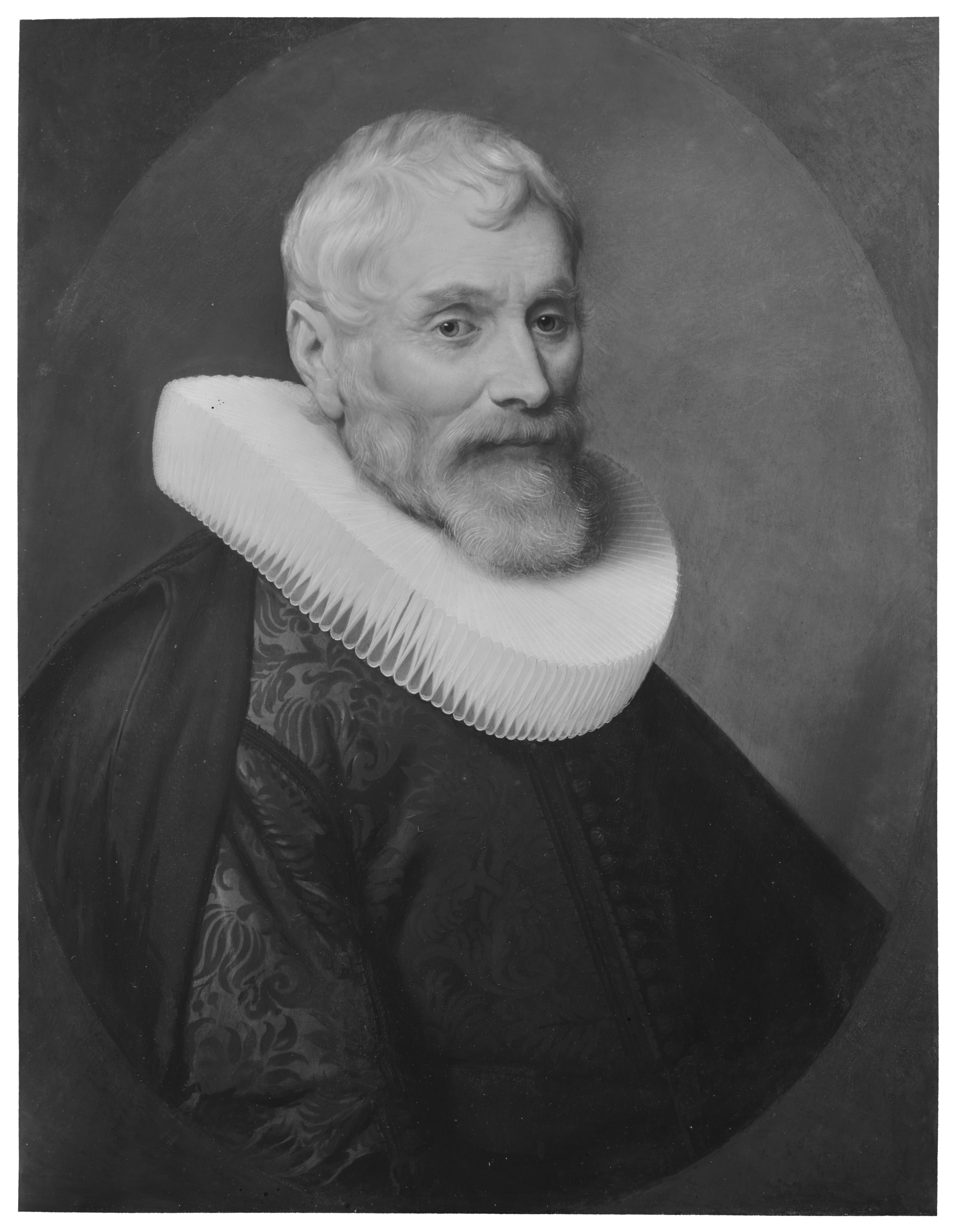 detail van een grotere afbeelding